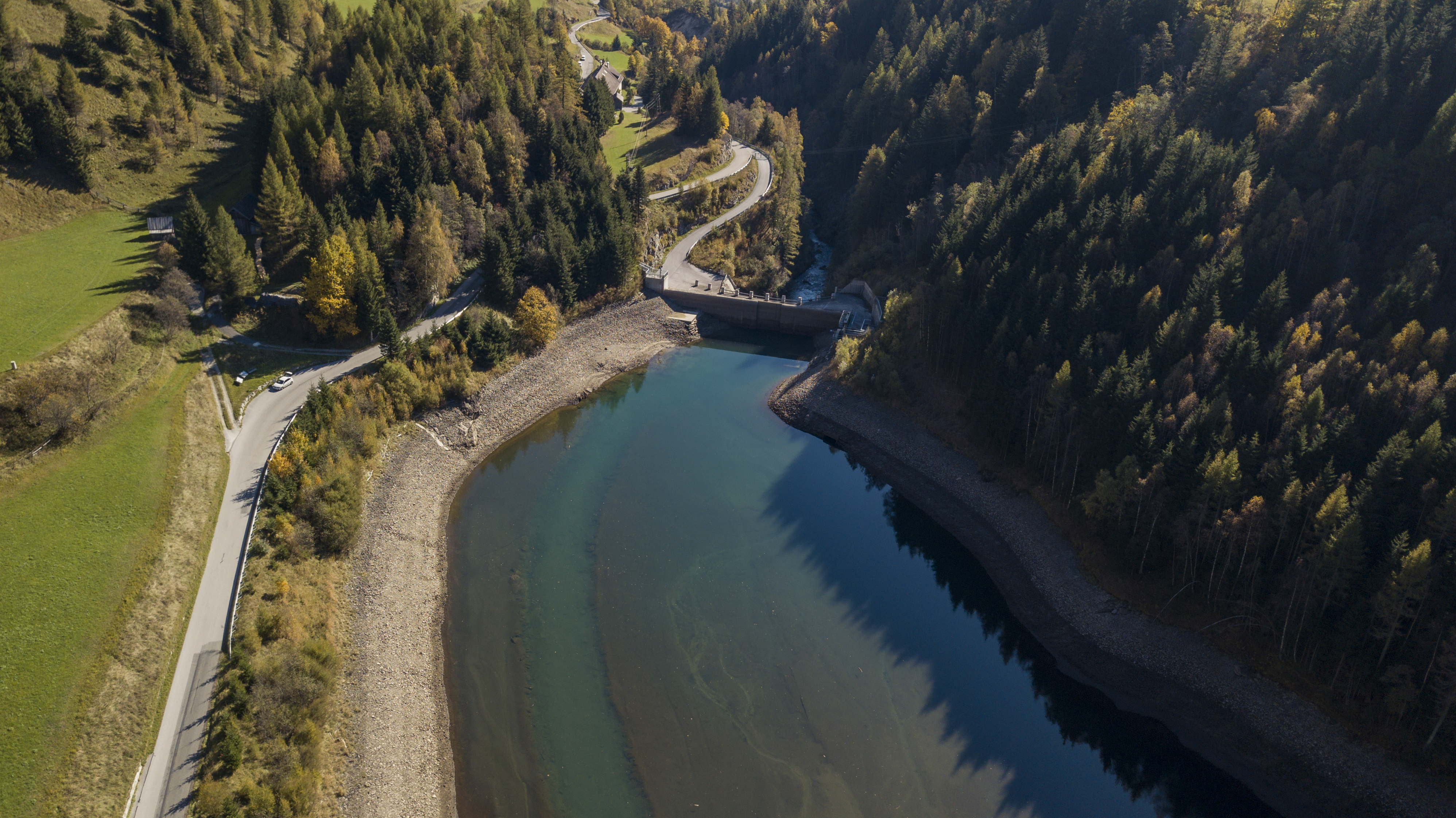 Drone shot of the Öllschützenspeicher in Muhr, Austria